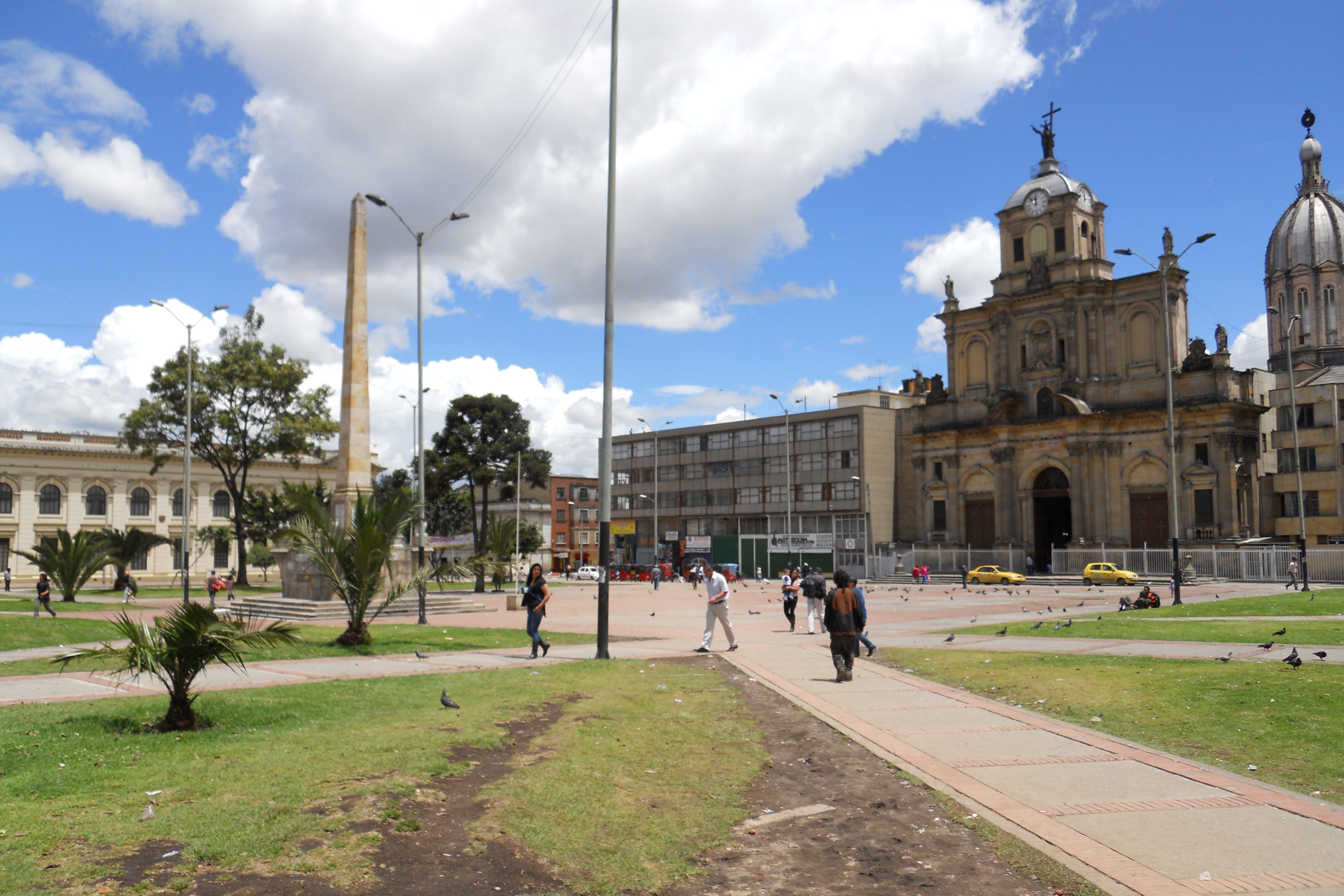 Plaza de Los Mártires, av. Carcas. Bogotá.